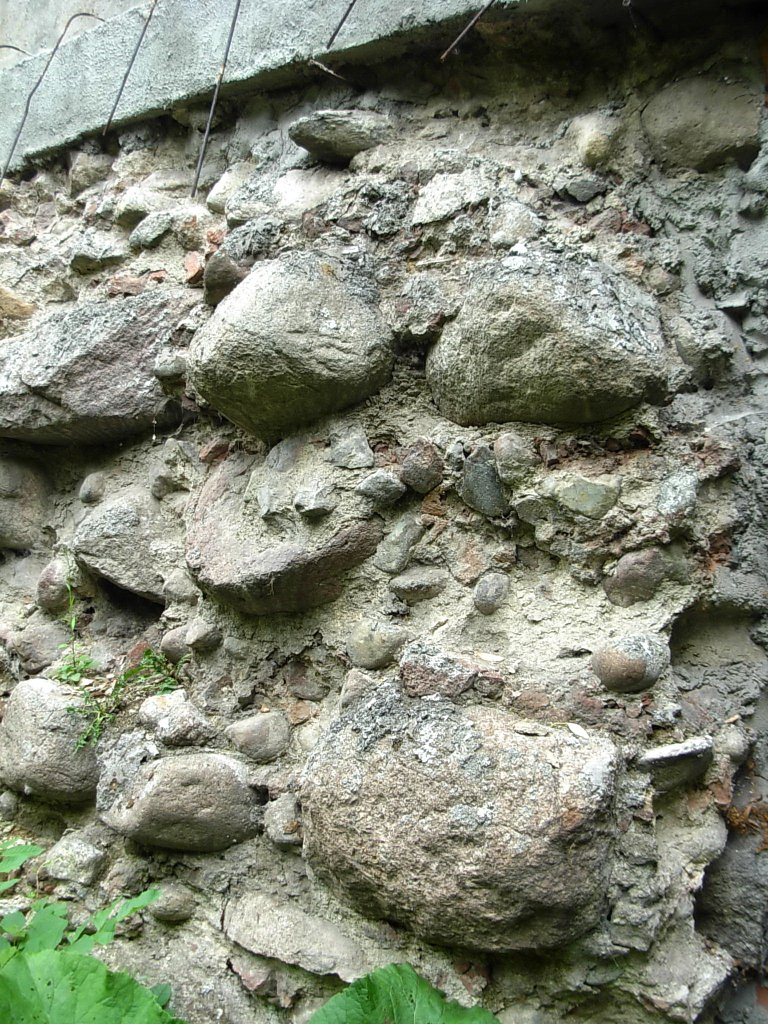 Relikty muru miejskiego w Bydgoszczy